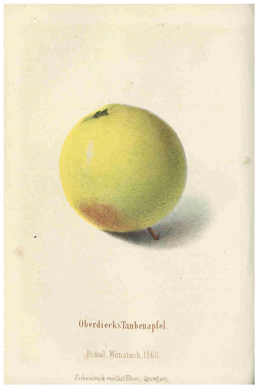 Kolorierte Abbildung der Apfelsorte ‘Oberdiecks Taubenapfel’